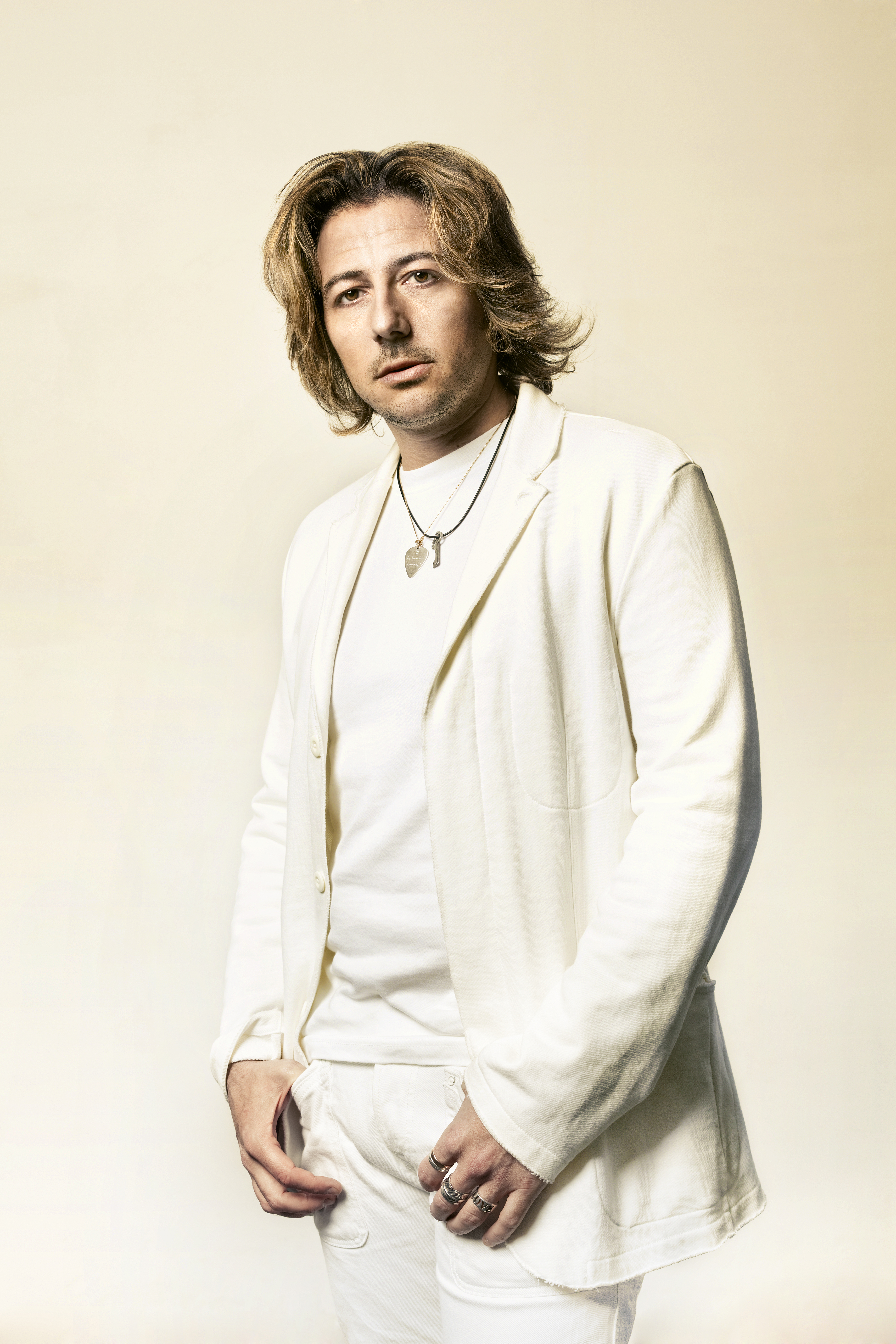 Simone Tomassini